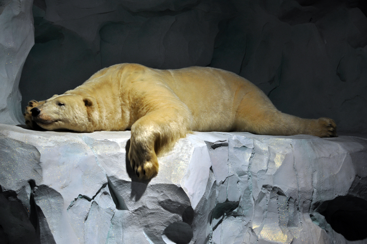 Taxidermied Ursus maritimus